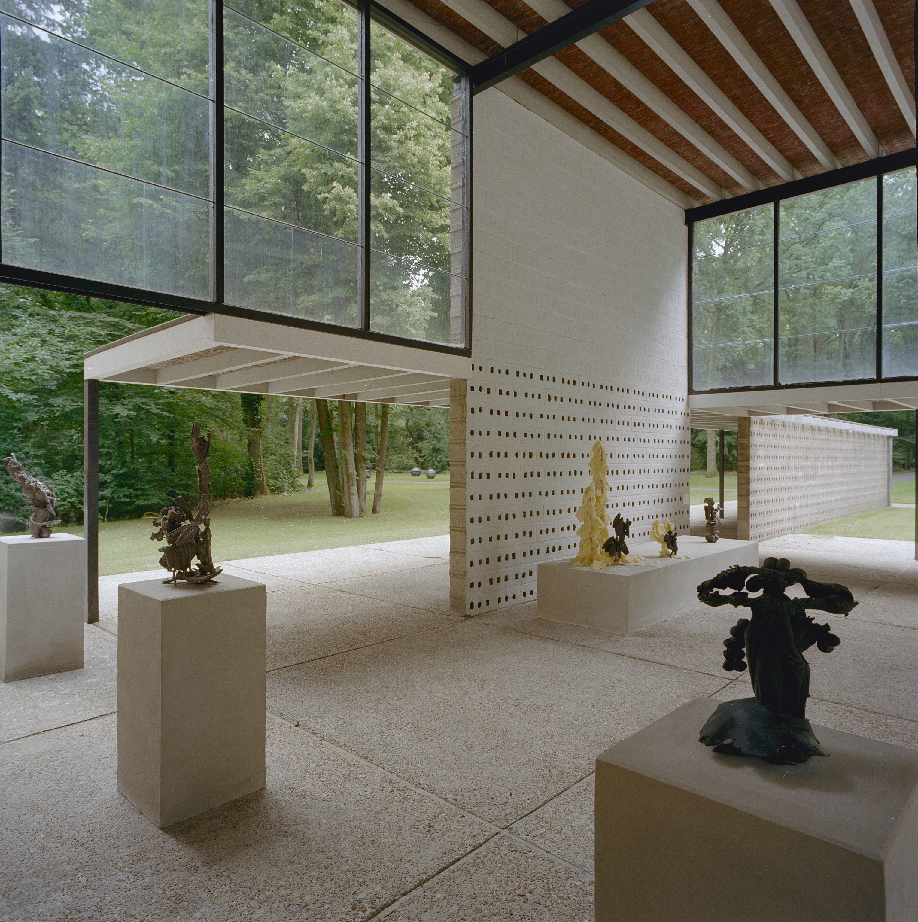 Sonsbeekpaviljoen in beeldentuin, Kröller-Müller Museum: Interieur met verschillende beelden (opmerking: Gefotografeerd voor Toonbeelden van de Wederopbouw)